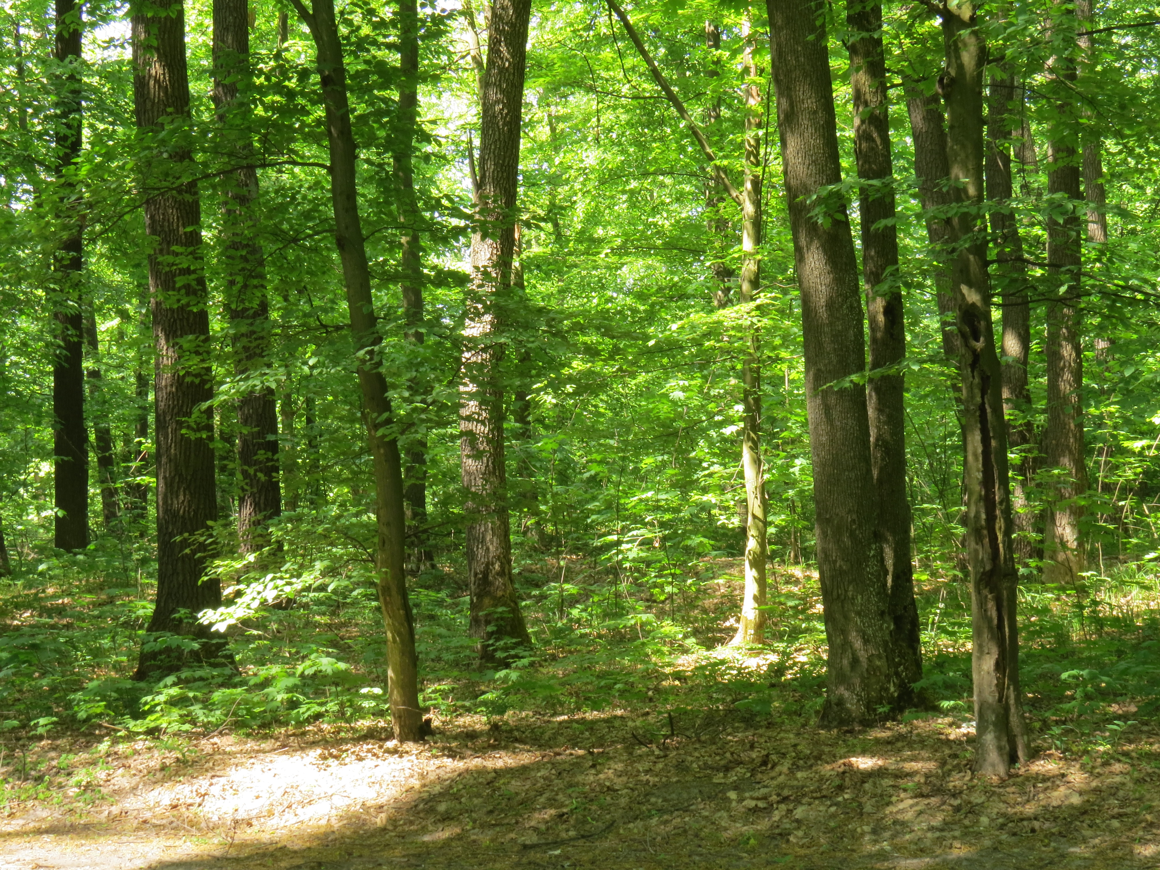 Пам'ятка природи «Урочище Бабка» біля с. Пороскотень Бородянського р-ну Київської обл. Дубово-грабовий ліс.